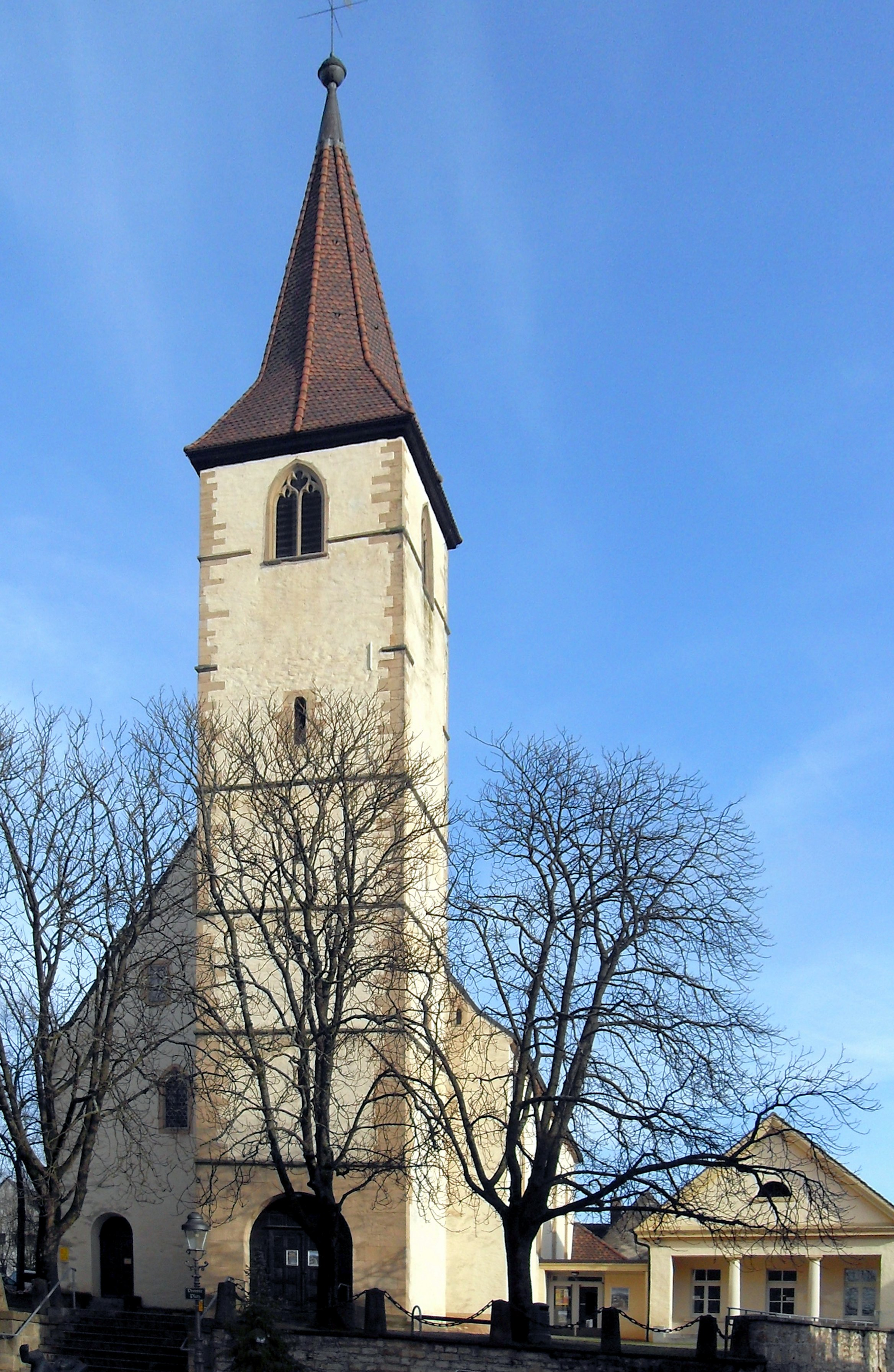 Kirche St. Martin in Müllheim, Westseite